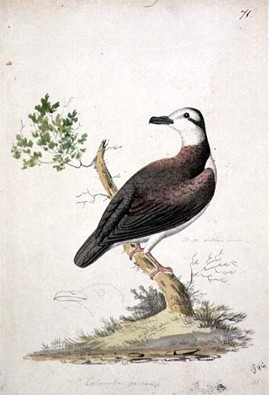 Polynesische Erdtaube (Gallicolumba erythroptera) eventuell aus Moorea (Plate 71). Gemalt von William Ellis während er James Cook auf seiner Dritten Südseereise (1776-78) begleitete.